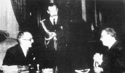 Es una foto del 1958 del recién electo presidente Arturo Frondizi con el escritor Jorge Luis Borges.